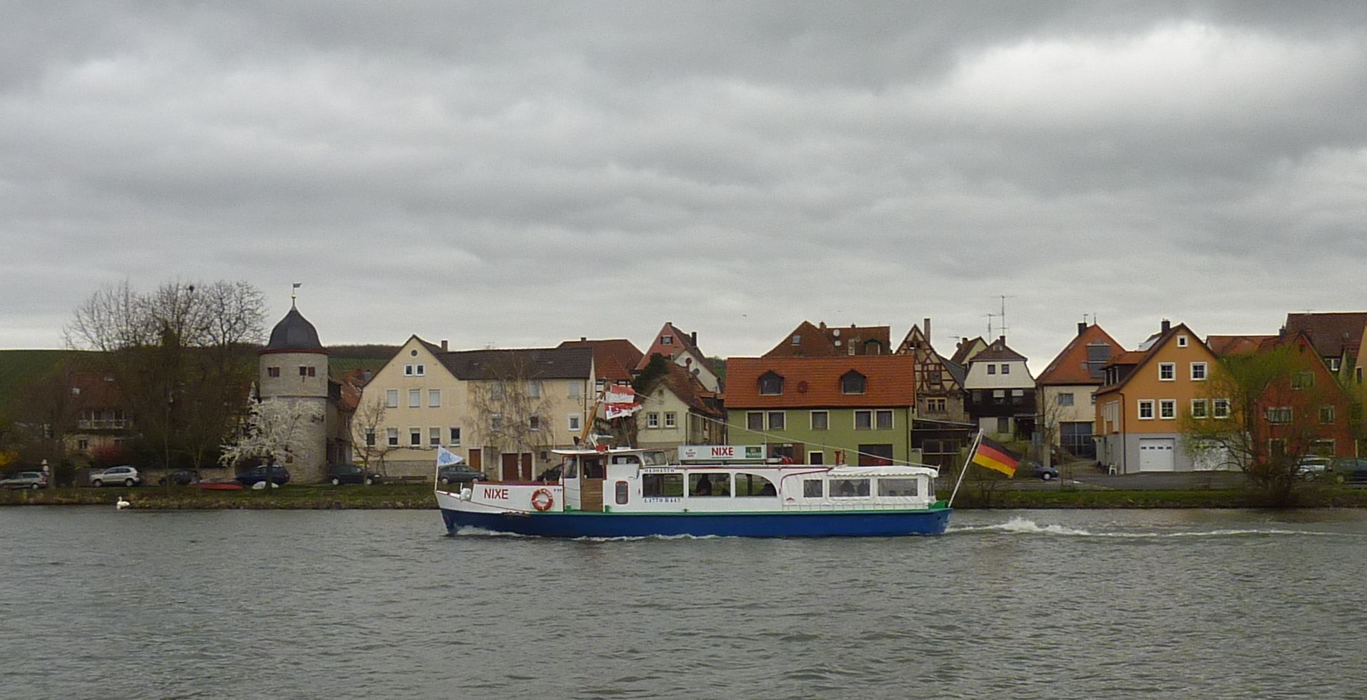 Die Nixe auf dem Main in Marktbreit mit Segnitz im Hintergrund